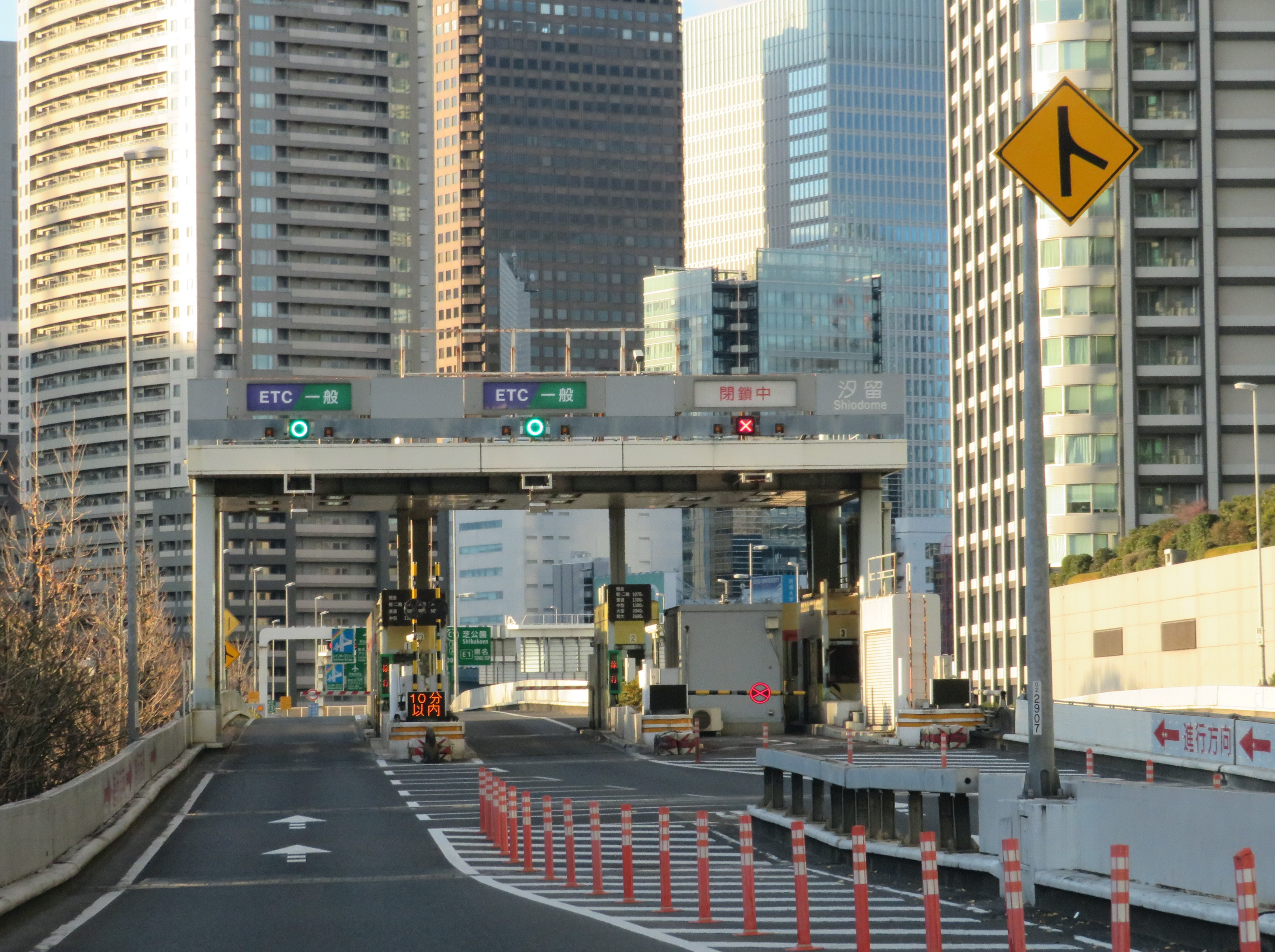 首都高速道路都心環状線 汐留入口料金所付近 Canon PowerShot SX720 HS